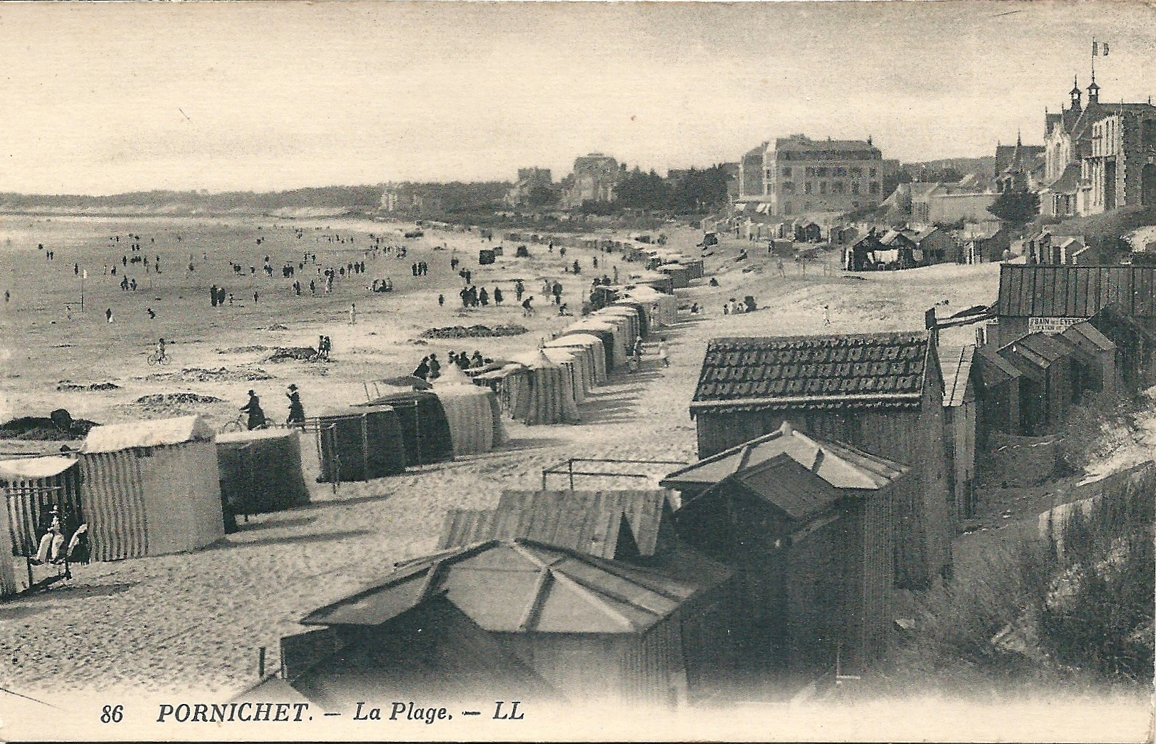 Pornichet (Loire-Inférieure, France) : la plage.